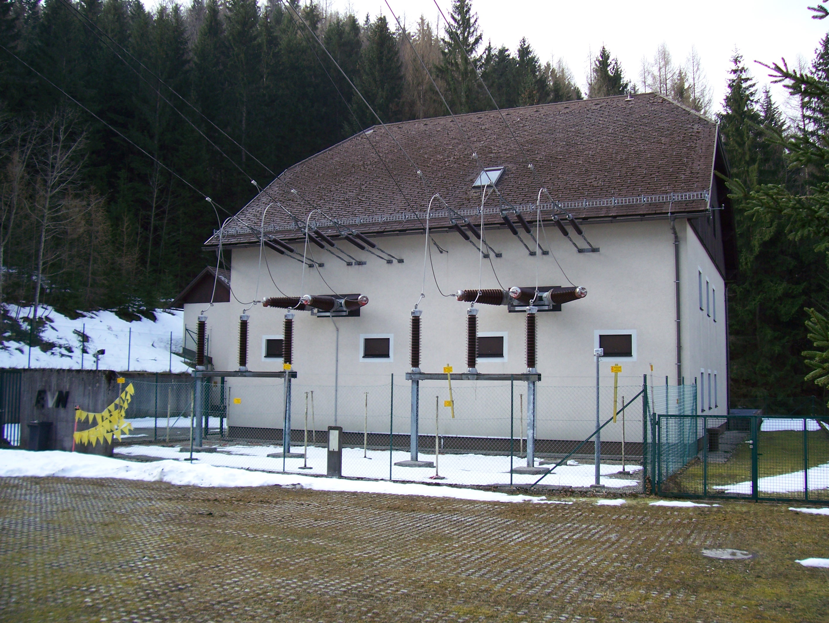 110-kV-Innenraum-Umspannwerk (Innenraumanlage) der EVN im Bezirk Scheibbs, Niederösterreich Kamera: Kodak C663 Danksagung: Unter freundlicher Mitwirkung und Unterstützung der: EVN AG, EVN Platz, 2344 Maria Enzersdorf, Hr. E. Jungwirth & Hr. Mag. S. Zach